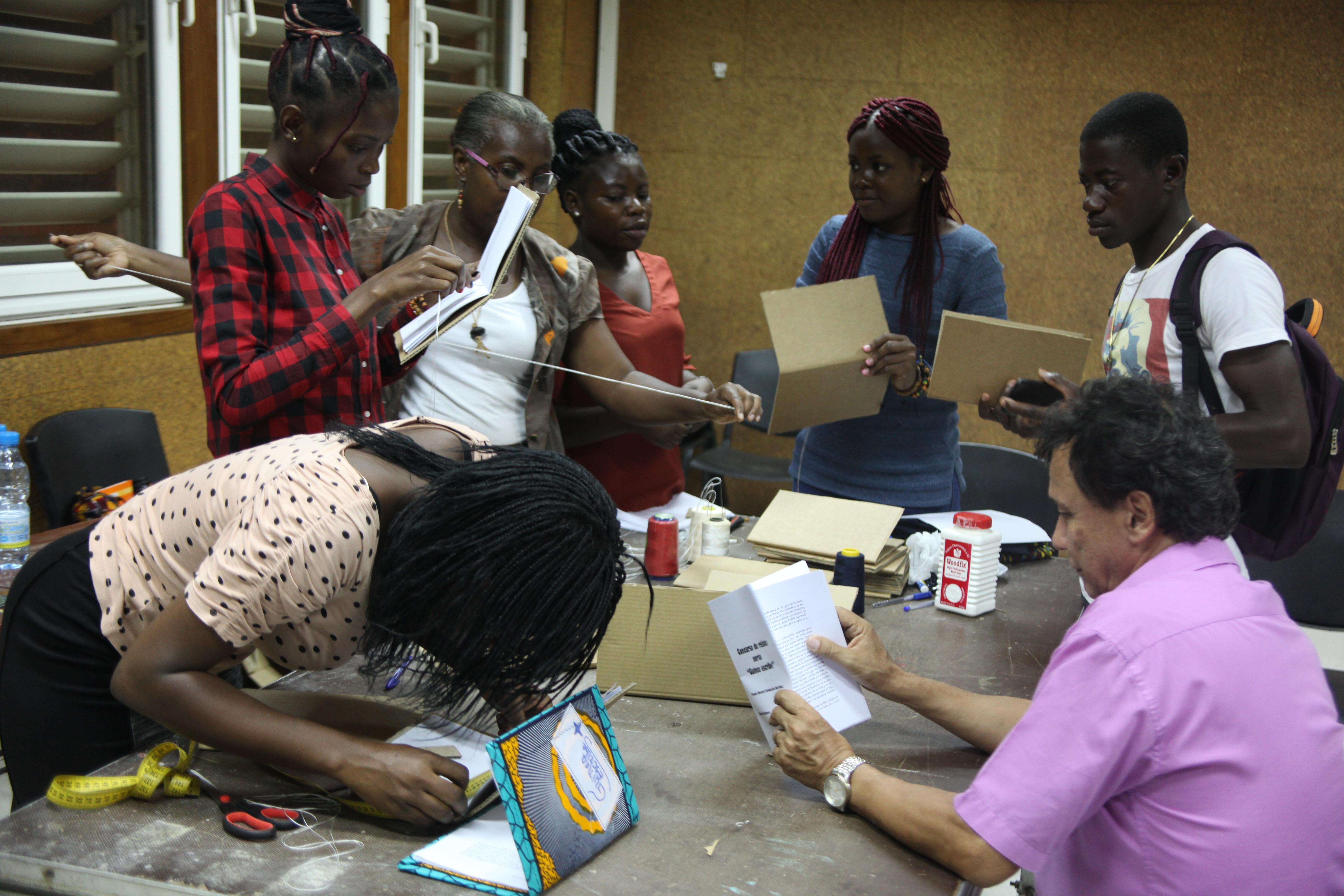 Taller de editoriales cartoneras en el Centro Cultural de España en Malabo. Colectivo de mujeres artesanas. This is an image of "African people at work" from Equatorial Guinea